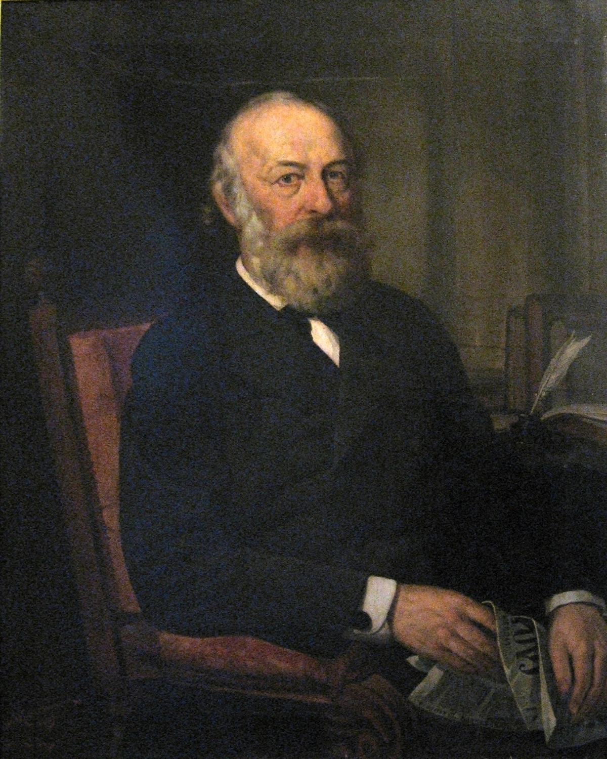 Bohdan Dedyckiy 1889 by Teofil Kopystynski 1844-1916